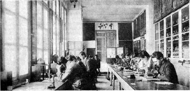 L'Ecole Coloniale d'Agriculture de Tunis, Tunisie